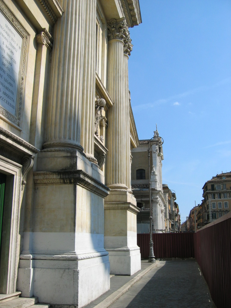 Facciata della chiesa di San Rocco, Roma